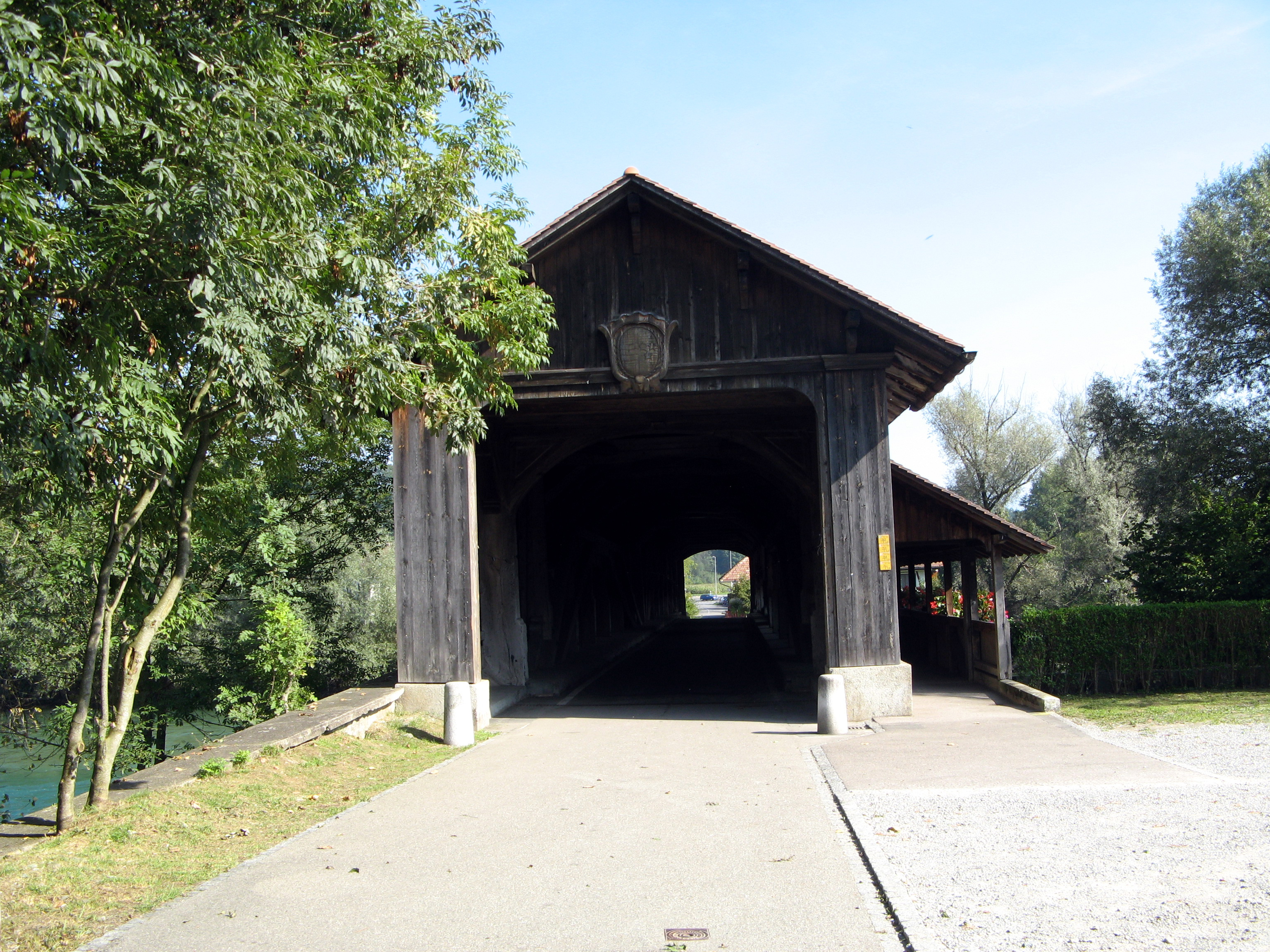 Reussbrücke Sins–Hünenberg, Ansicht von Westen (Aargauer Seite)